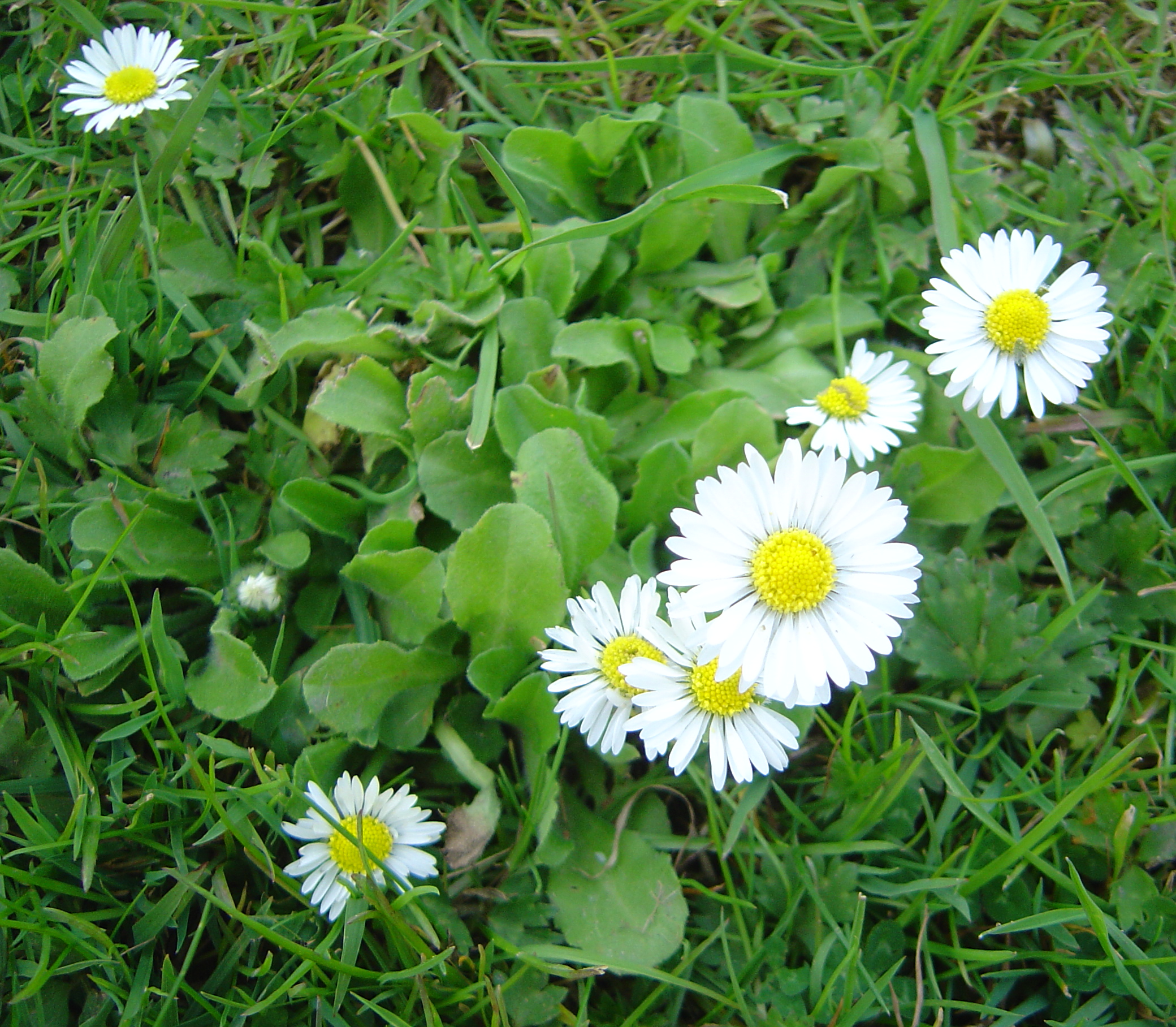 Bellis perennis En: Photograph taken at the Jardin des Plantes in Paris, France Fr: Photographie prise au Jardin des Plantes à Paris, France